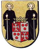 Wappen der Gemeinde Geleen.